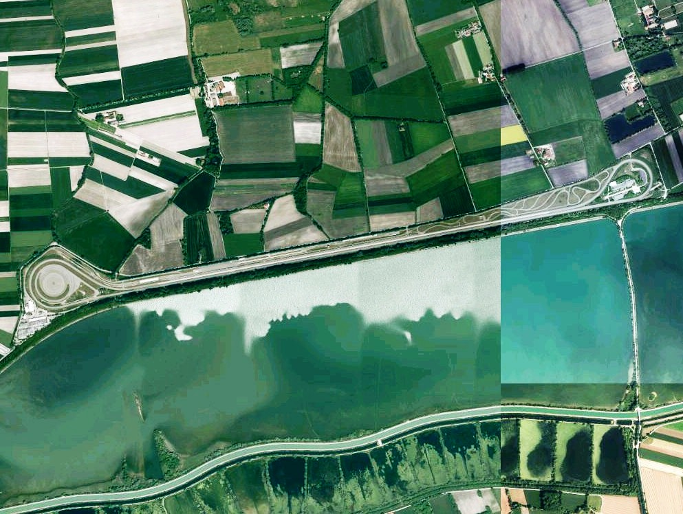 Luftaufnahme der Bayerischen Vermessungsverwaltung: BMW-Testgelände nördlich des Ismaninger Speichersees in Aschheim, Landkreis München, Bayern.